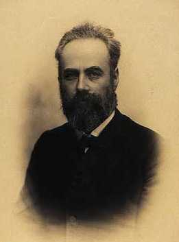 Herman Martin Trier (10.May.1845-01.Sep.1925). Dansk politiker, pædagog, sløjdskoleforstander, gift med Emma Trier, fødtn Adler (1855-1912).